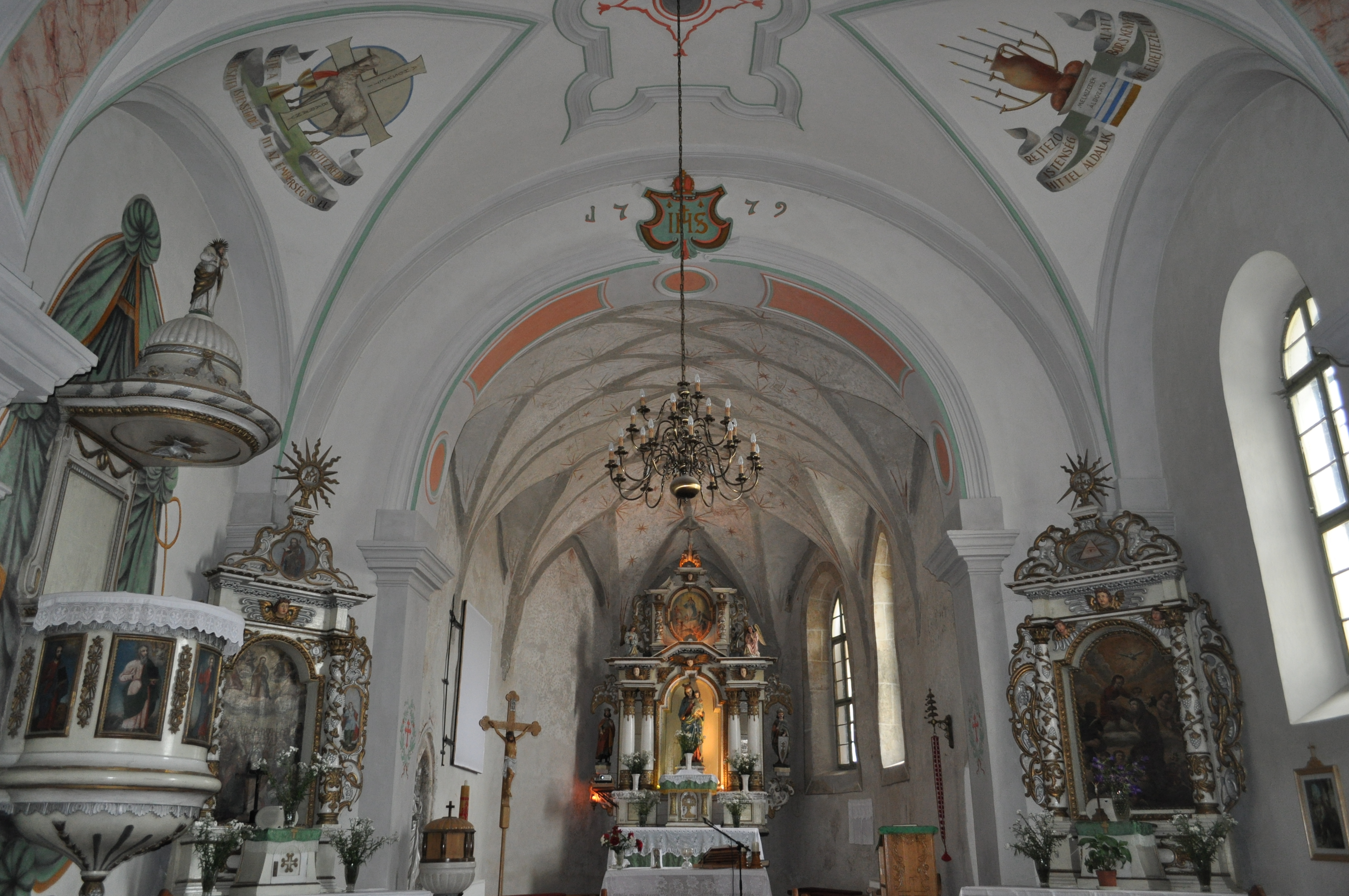 Lăzarea, județul Harghita